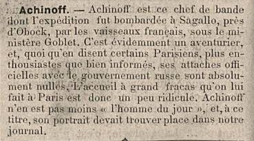 Article "Le cosaque Achinoff"